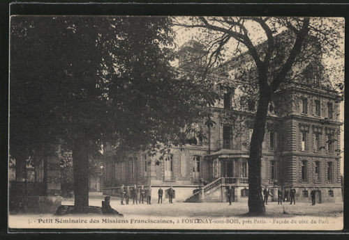 Façade du Petit séminaire des Missions franciscaines de Fontenay-sous-Bois